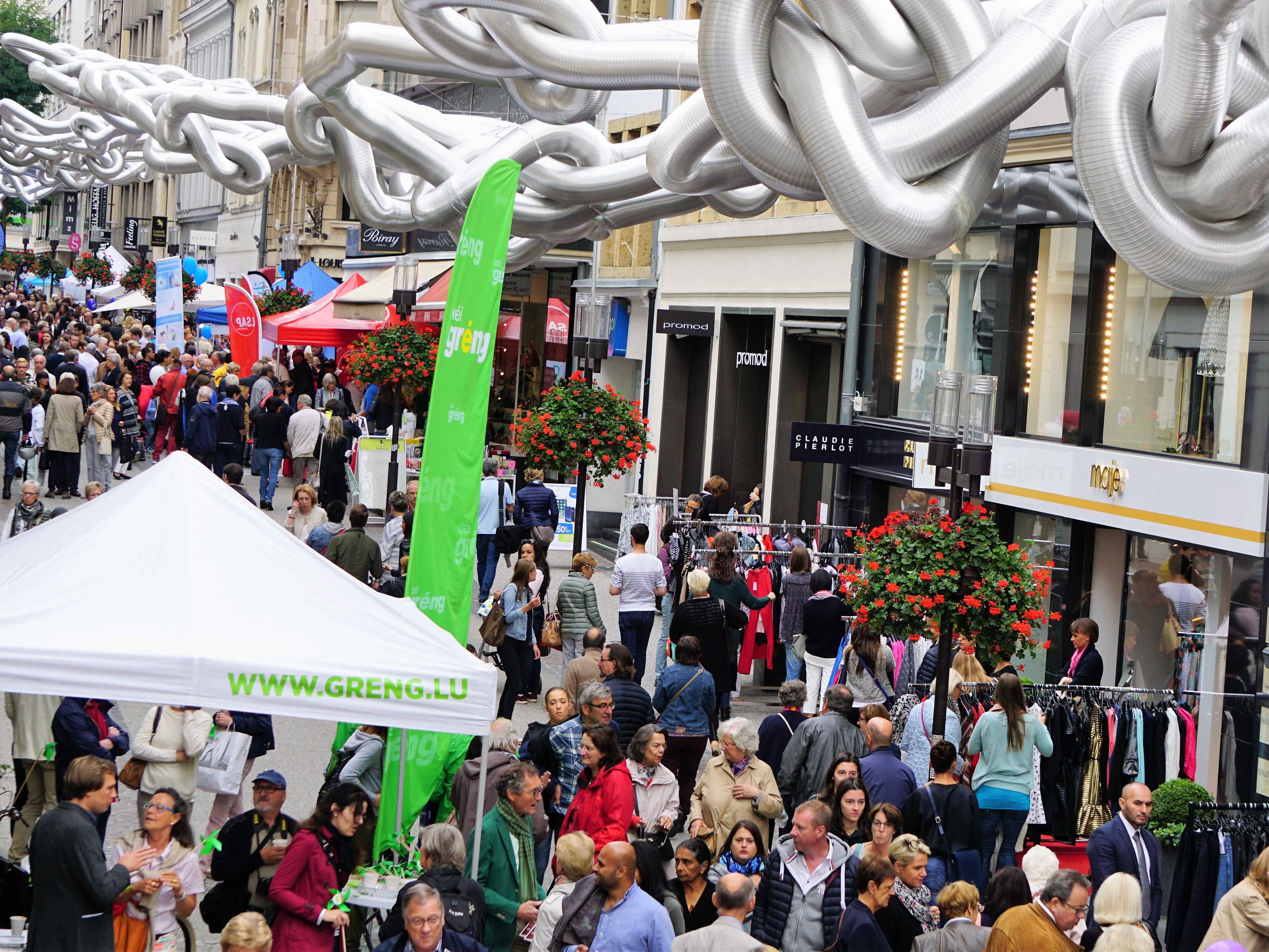 Braderie 2017 à Luxembourg, rue Philippe-II